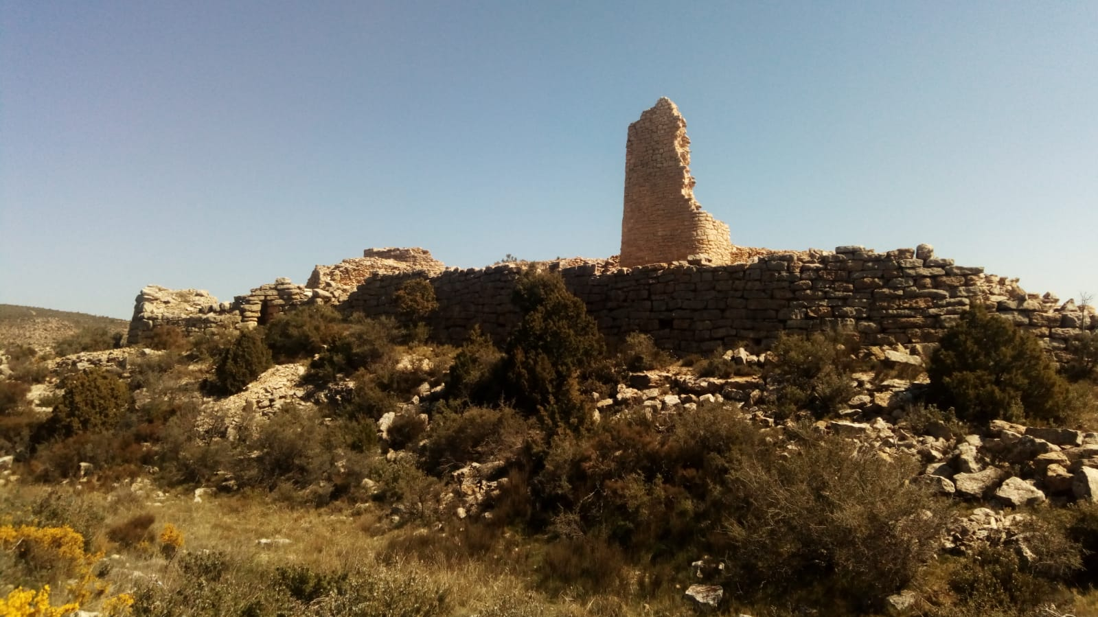 Castro ibérico de Cabezo de San Pedro en Oliete